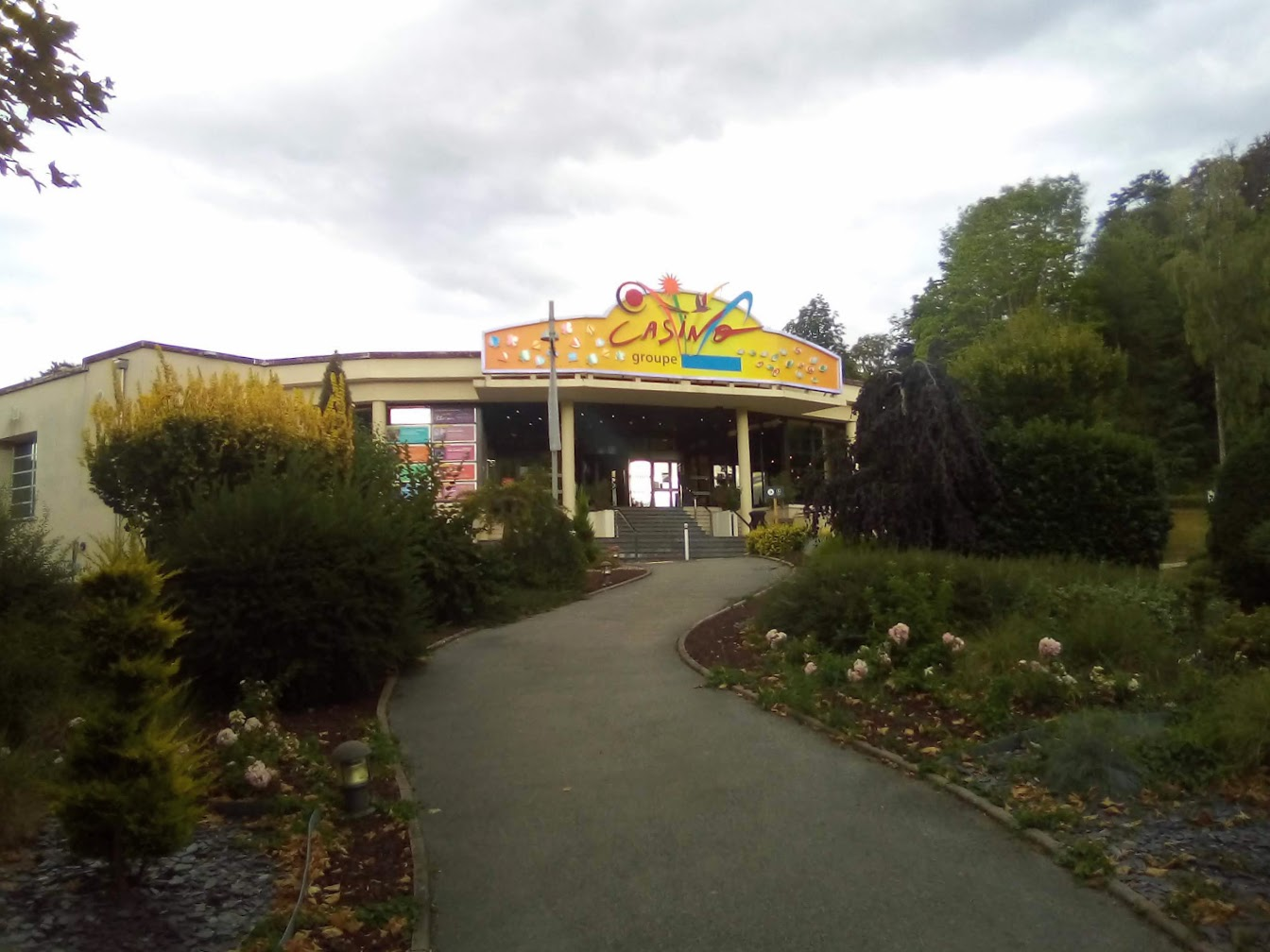 Casino de Bourbonne-les-Bains